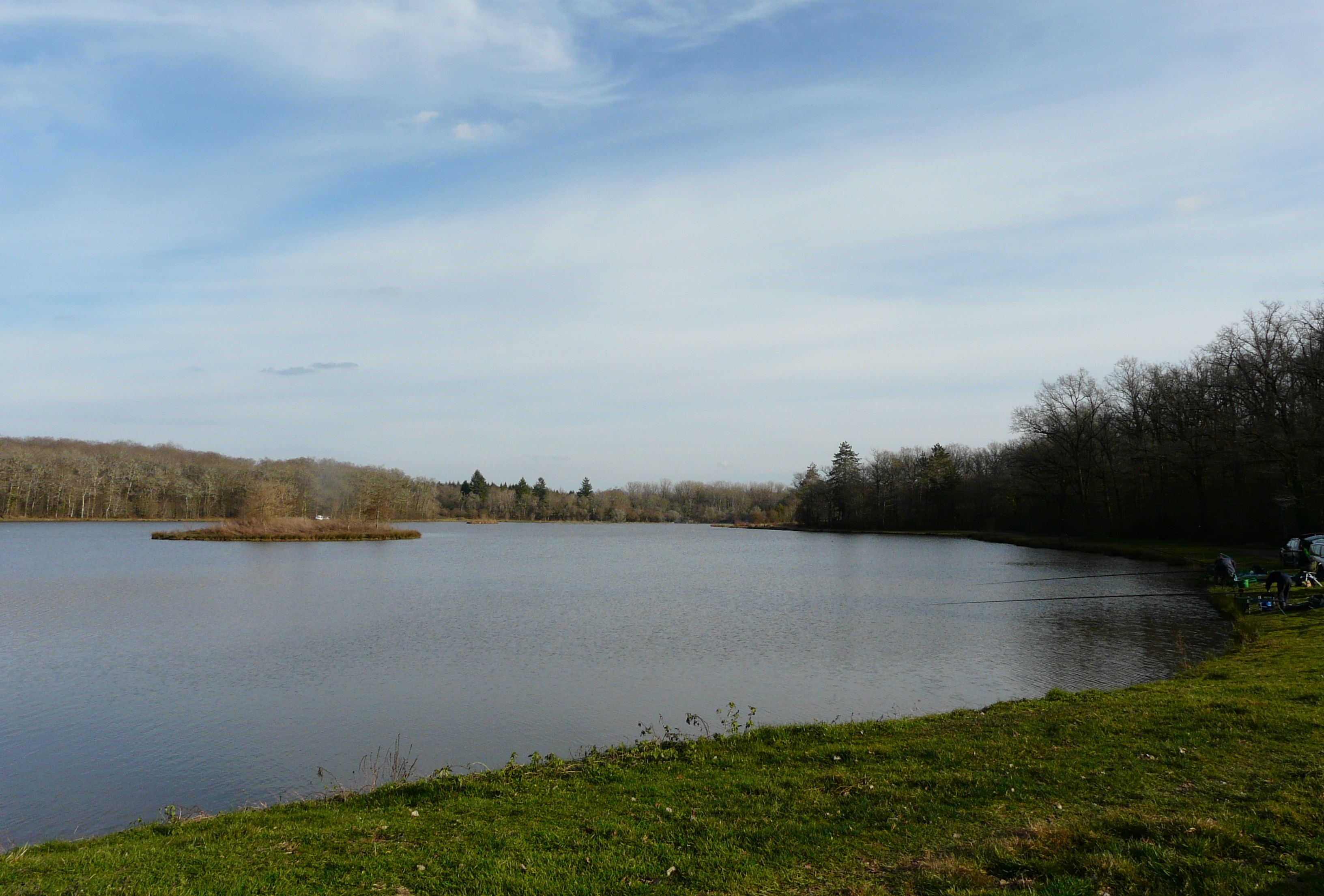 L'étang de Born à Salagnac, Dordogne, France. La rive sur la droite marquée par la ligne sombre des arbres se trouve sur la commune de Sainte-Trie.